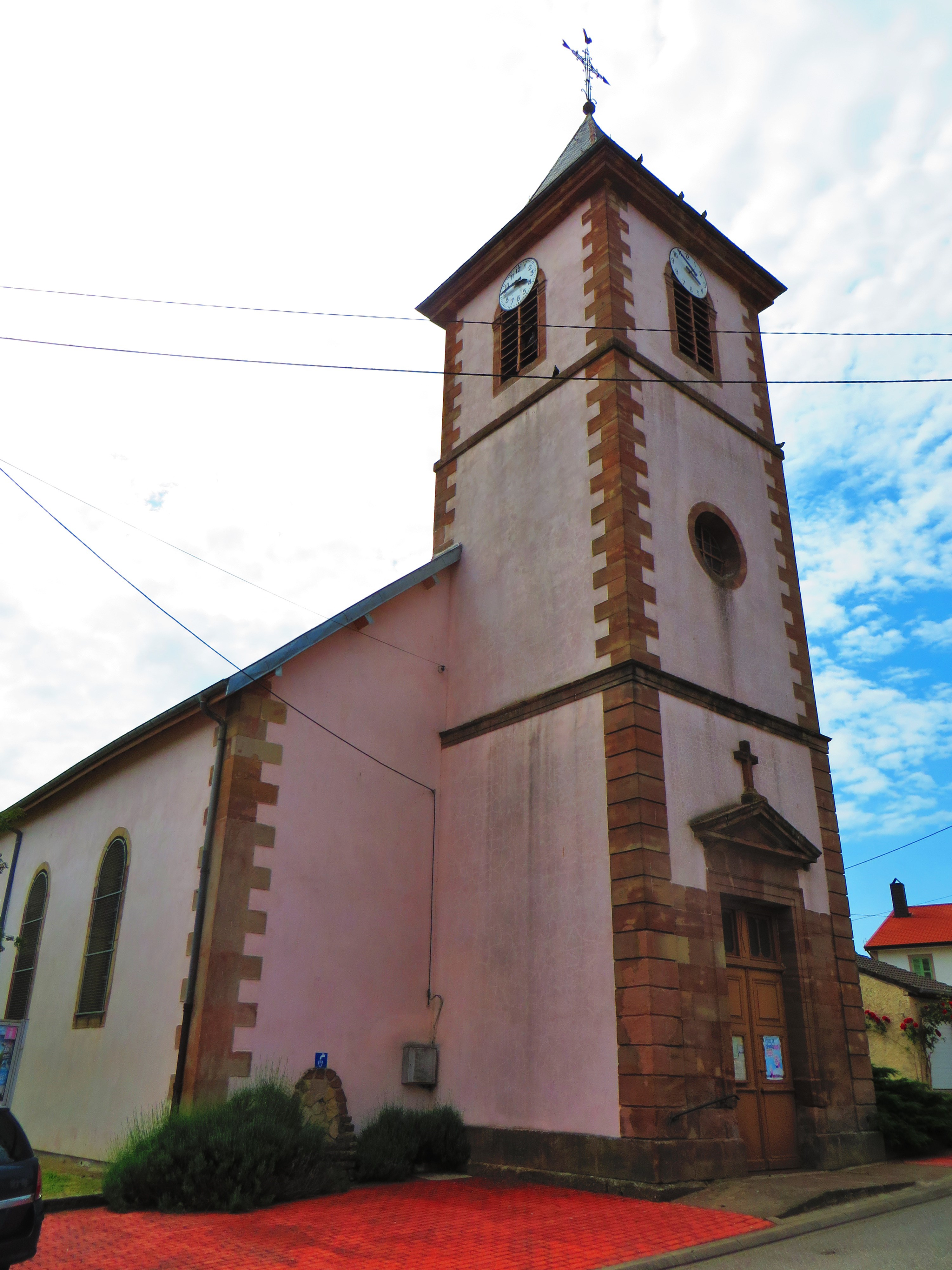 Bertrambois 54 eglise